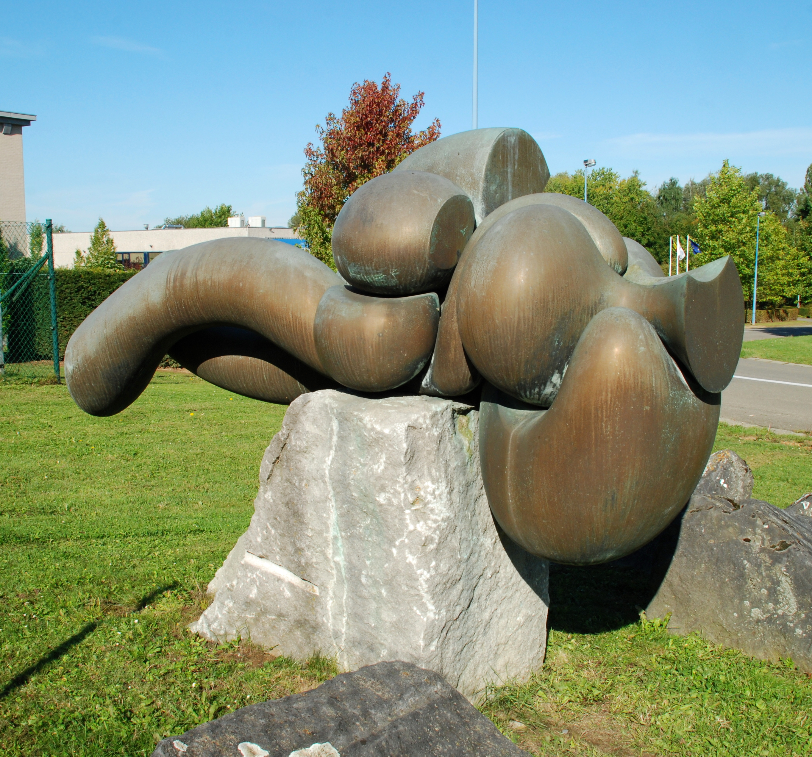 Belgique - Louvain-la-Neuve - L'Endormie VI (Olivier Strebelle, 1980)